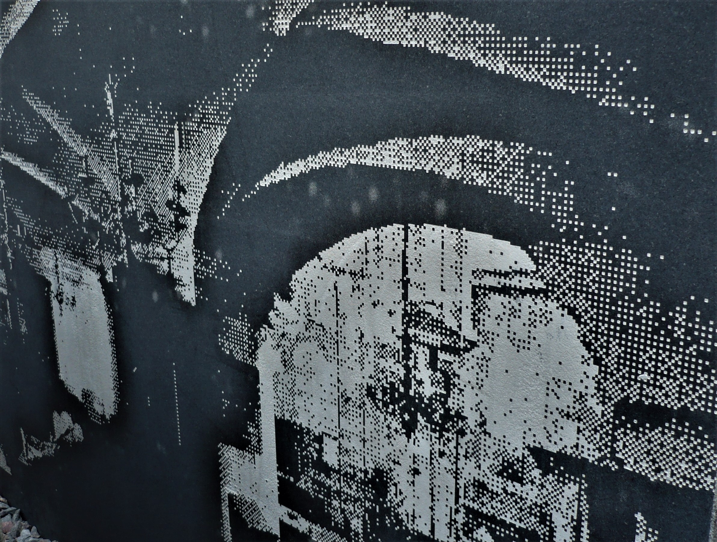 Synagoga Złota Róża we Lwowie. Pomnik